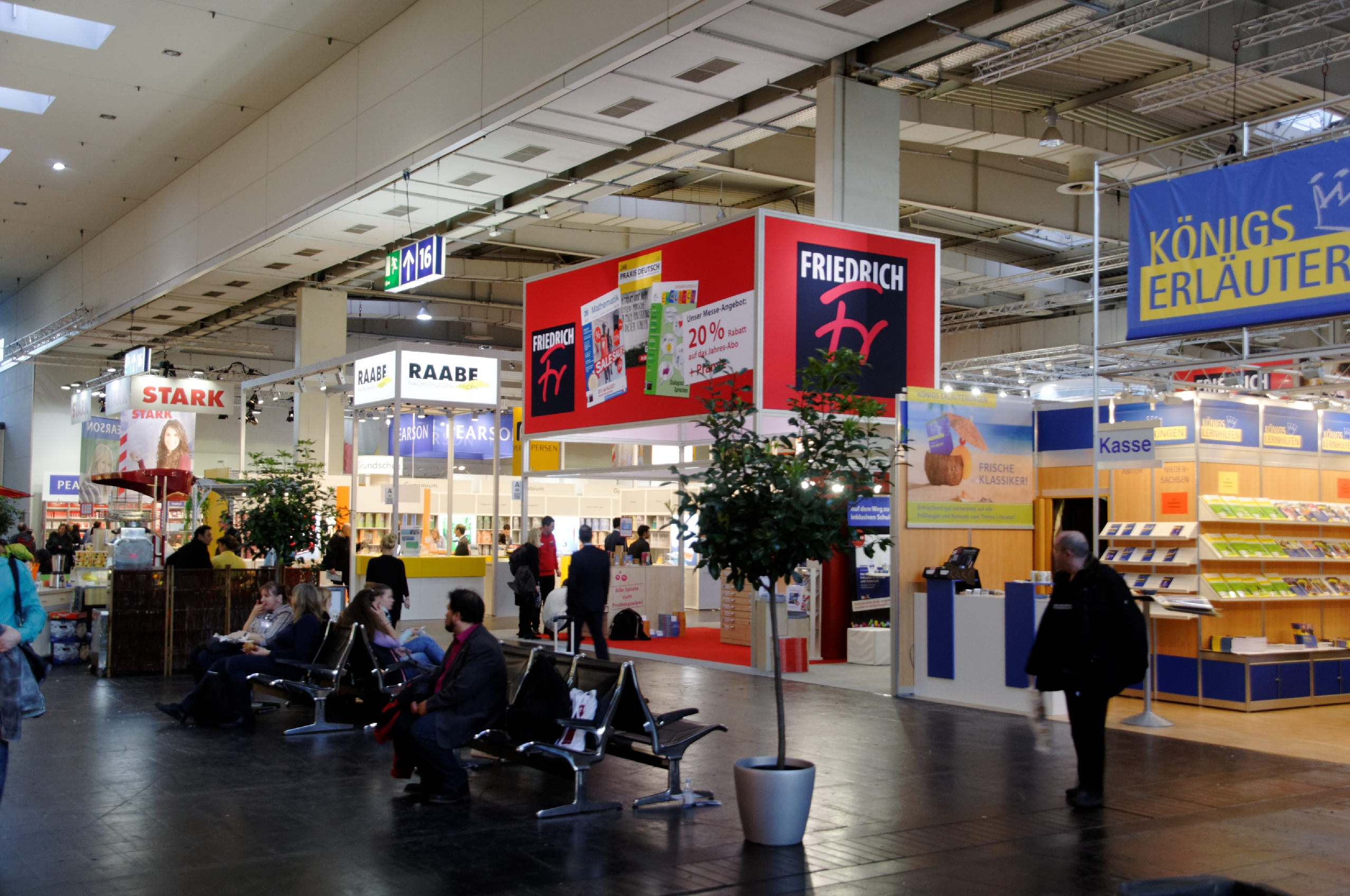 Bilder Didacta 2015.